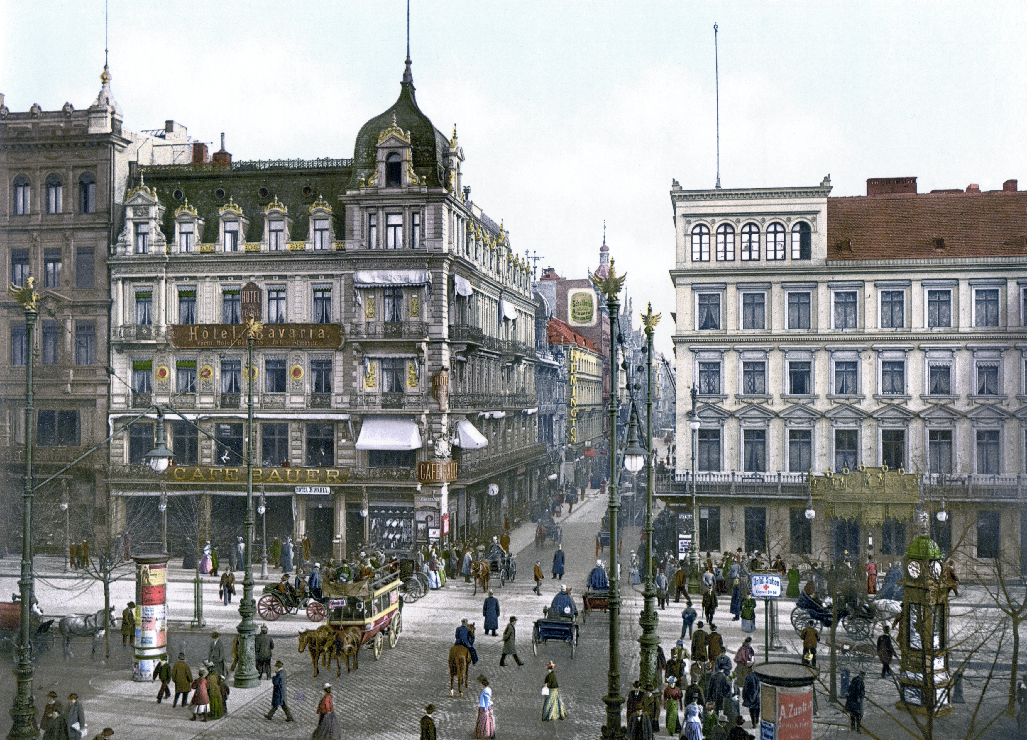 Berlin, Unter den Linden, Cafe Bauer zwischen 1890 und 1900